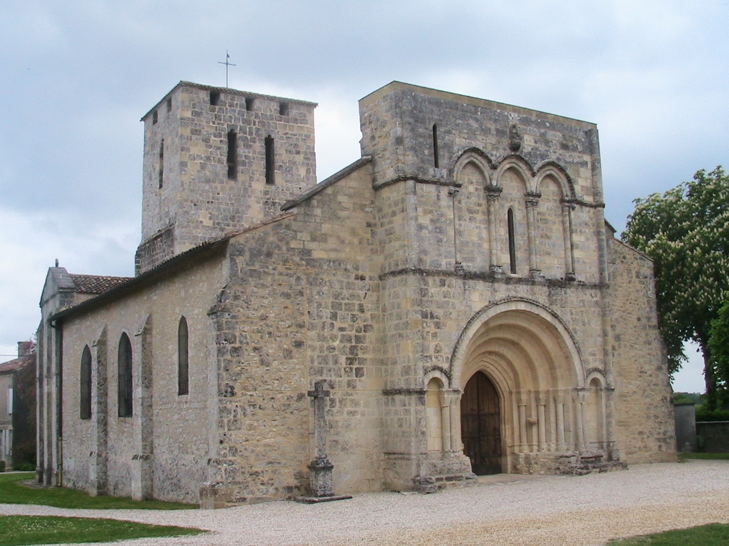 St Saturnin's church in Moulis-en-Médoc, Gironde (33), France